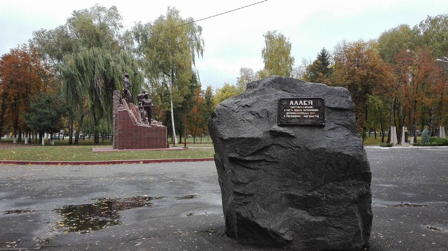 Памятный камень, посвященный закладке аллеи в парке Воинов-интернационалистов